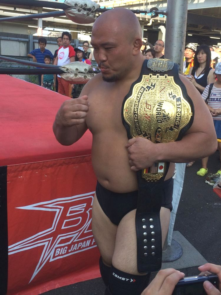 小机商店街